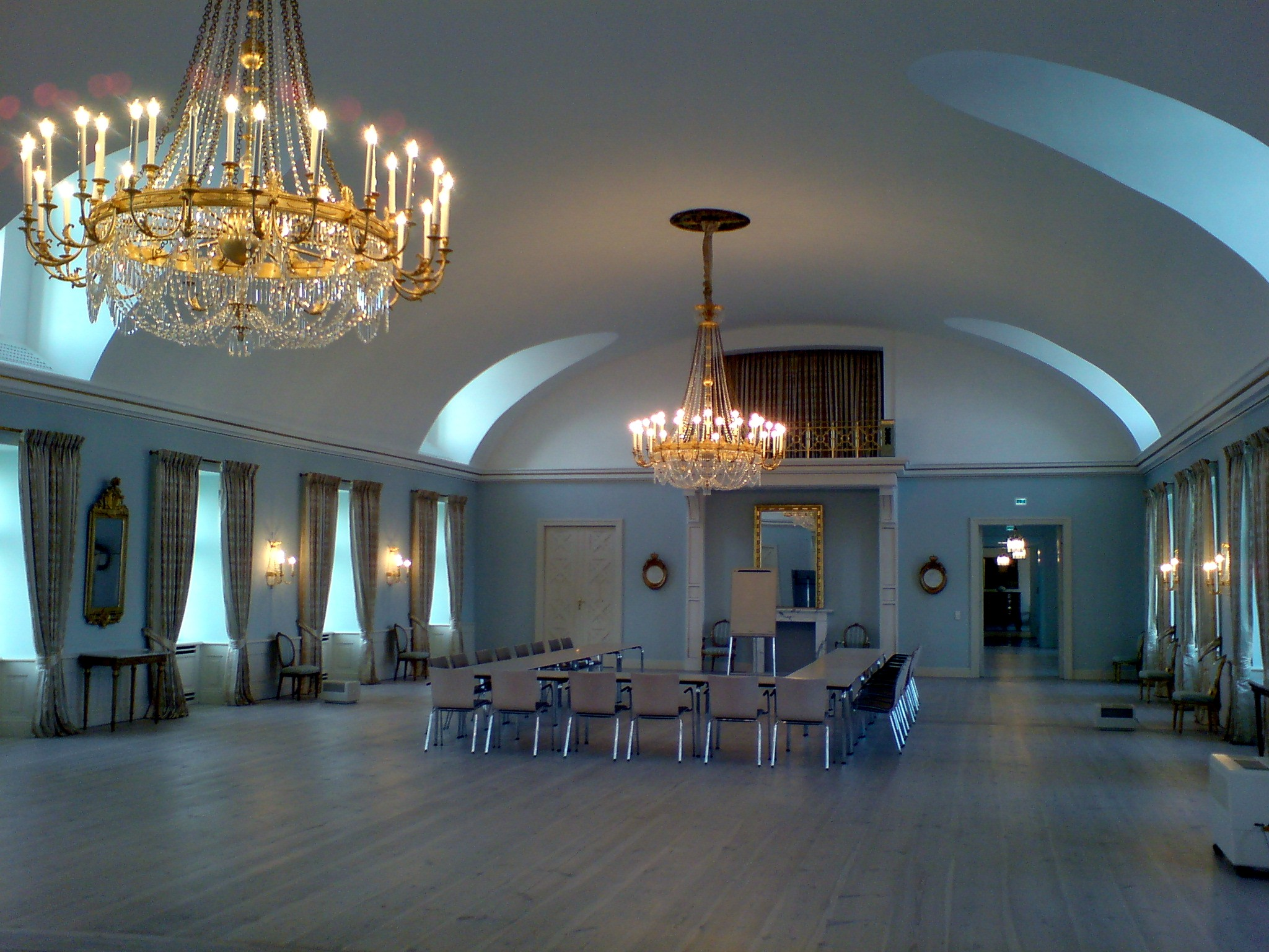 Schloss Plön, Rittersaal